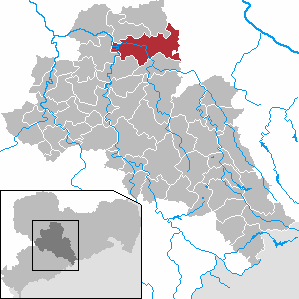 Döbeln in Saxony - district Mittelsachsen